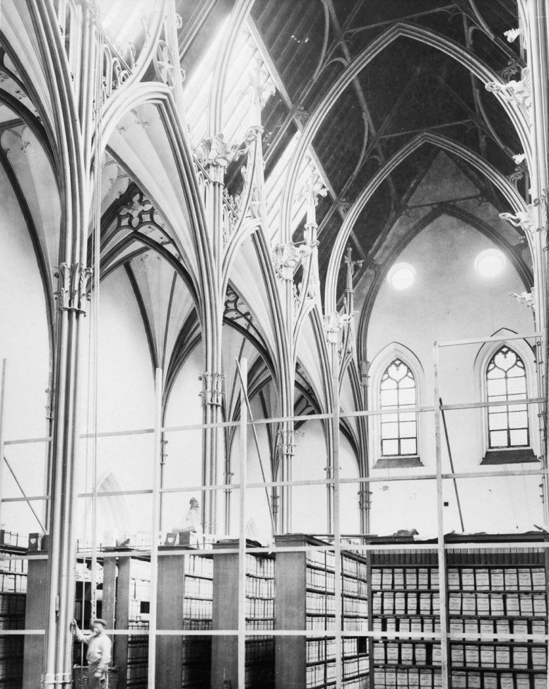 Voormalig paleis van de graven van Holland met Ridderzaal: inwendig v¢¢r de restauratie